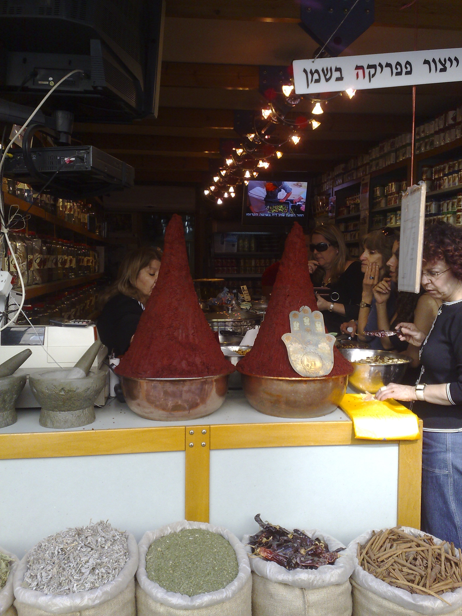 Lewinsky market